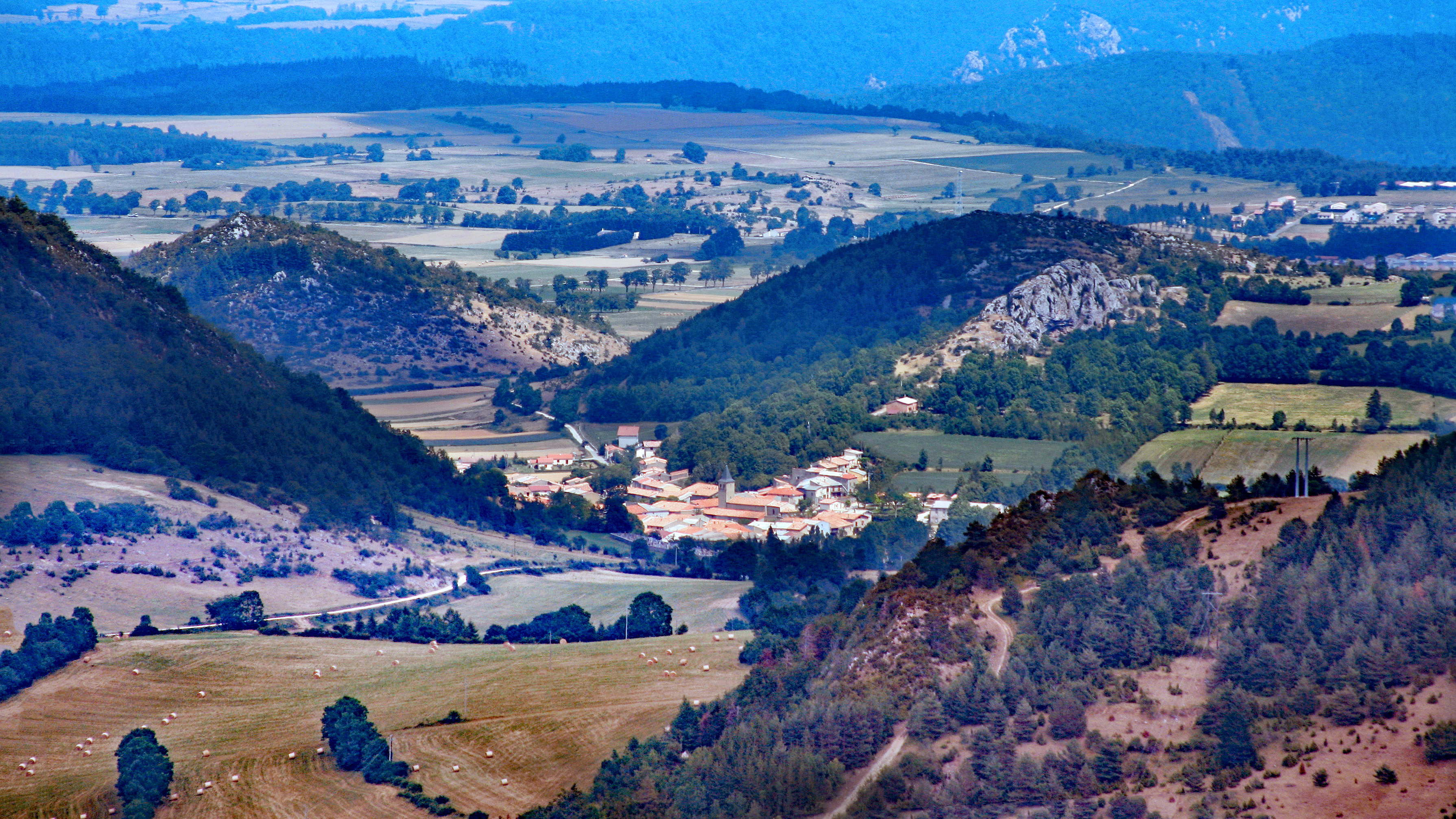 Vu de la Serre de Moncamp